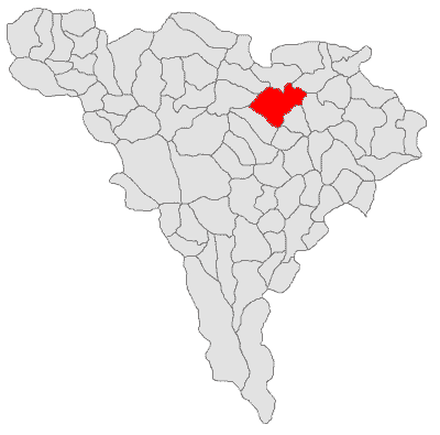 Categorie:Hărţi ale judeţului Alba